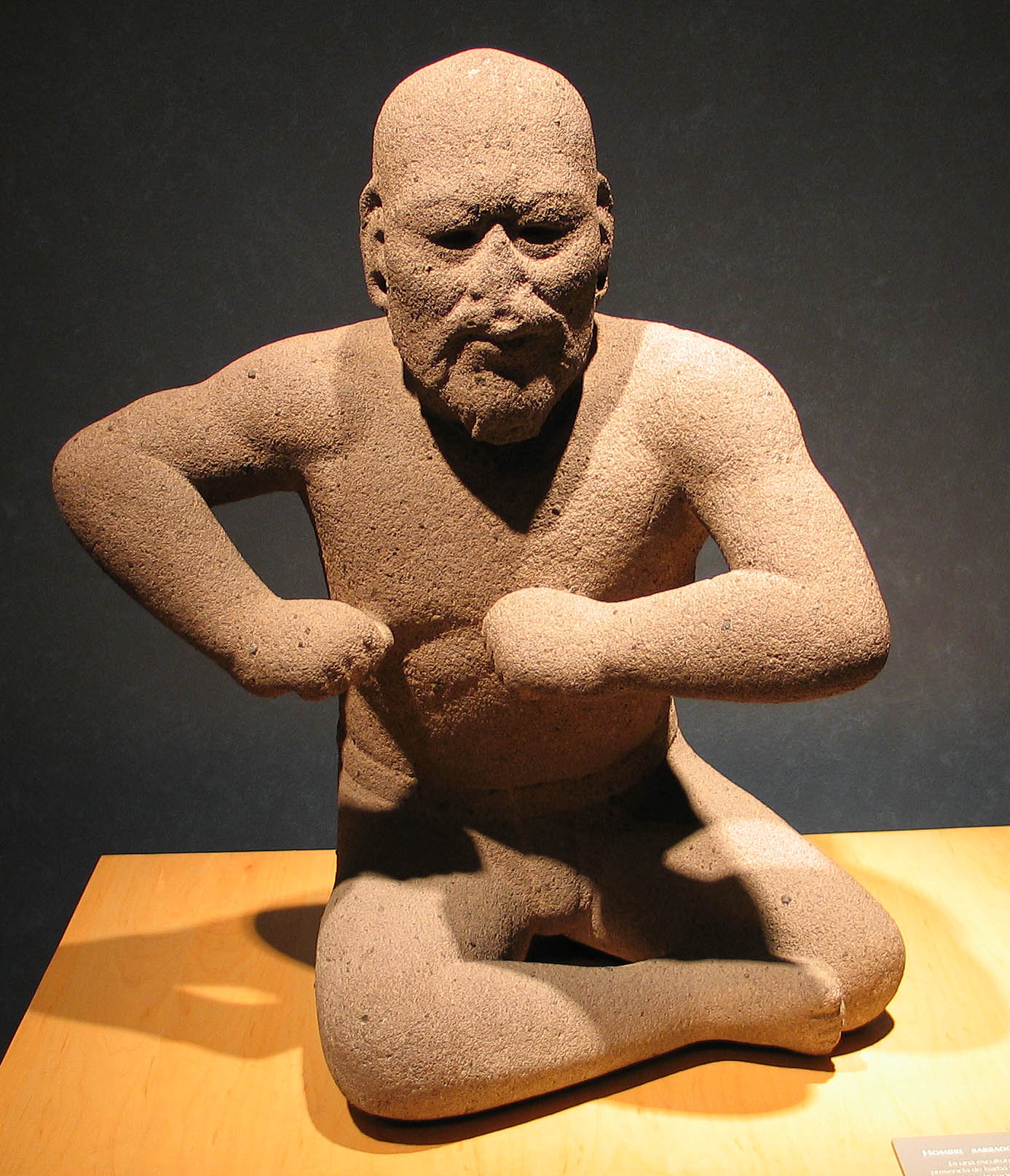 Luchador Olmeca, Nationalmuseum für Anthropologie, Mexiko-Stadt Photograph: Luidger 29. Dezember 2004